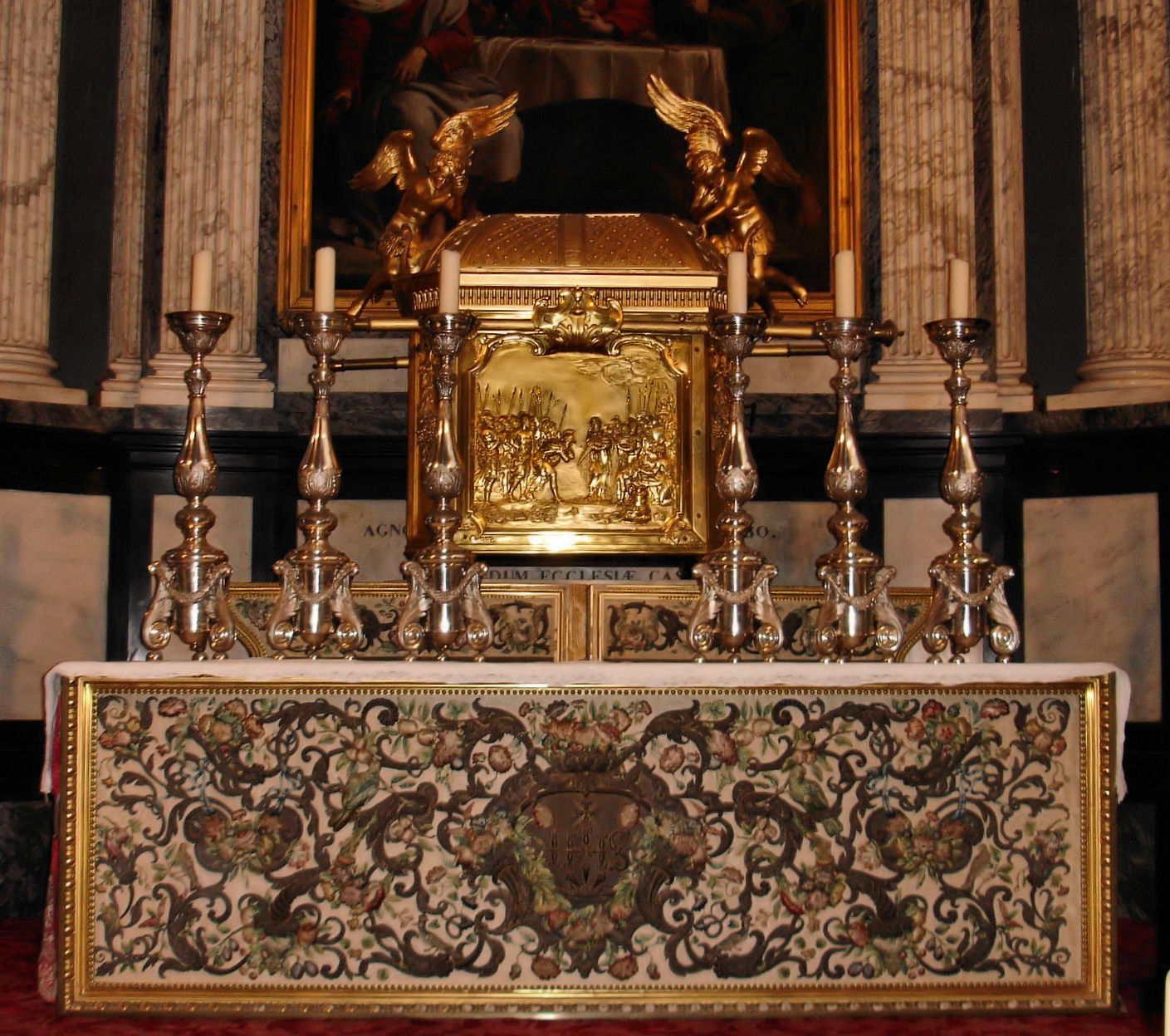 Antependium Kathedraal Antwerpen-Zijaltaar rechts, venerabelkapel. 17de eeuw. 87x 302 cm/Inv. 16